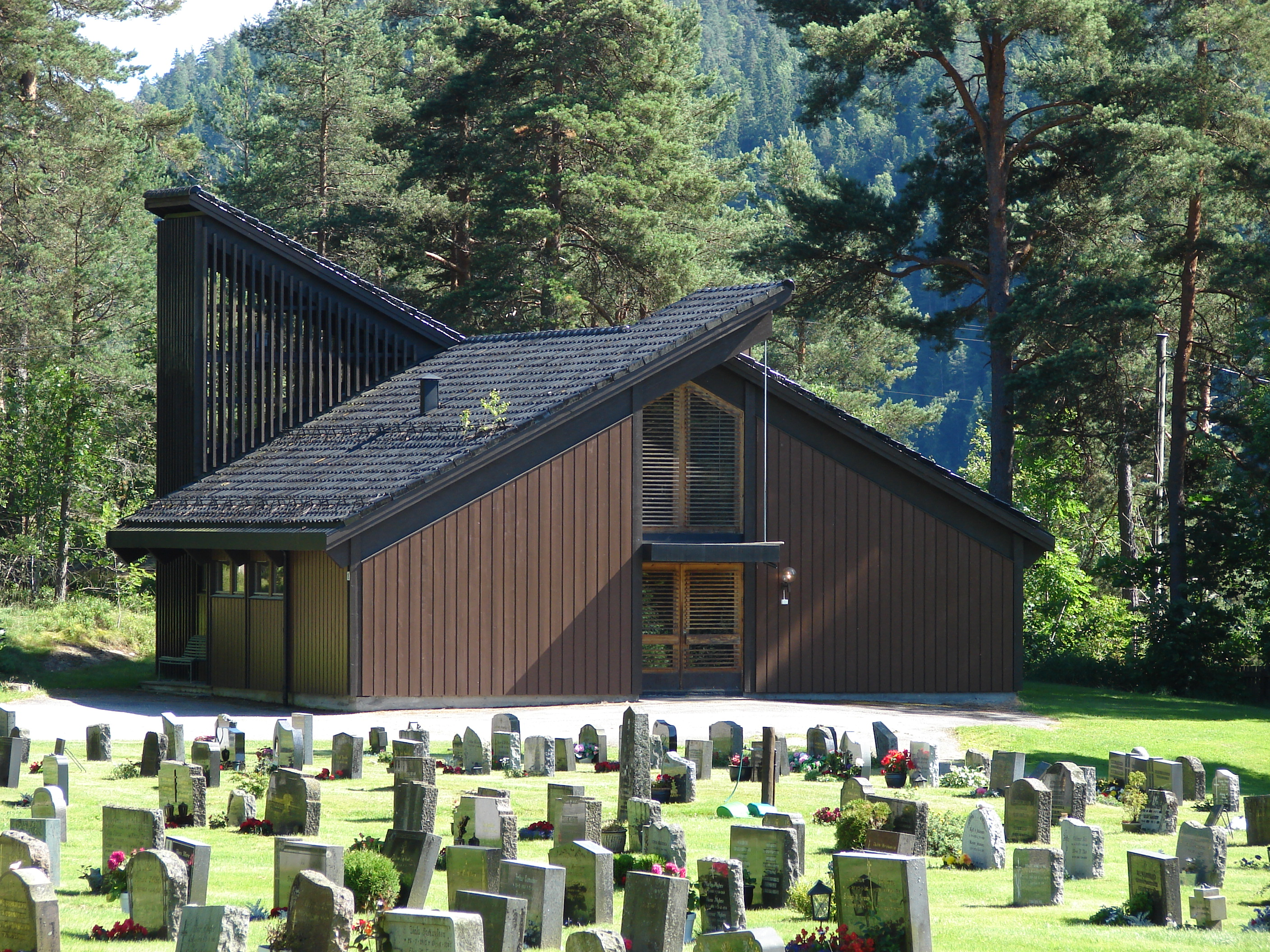 Pollen Kapel i Telemarken